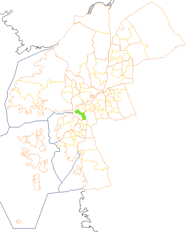 Karta som visar primärområdes belägenhet i Göteborg